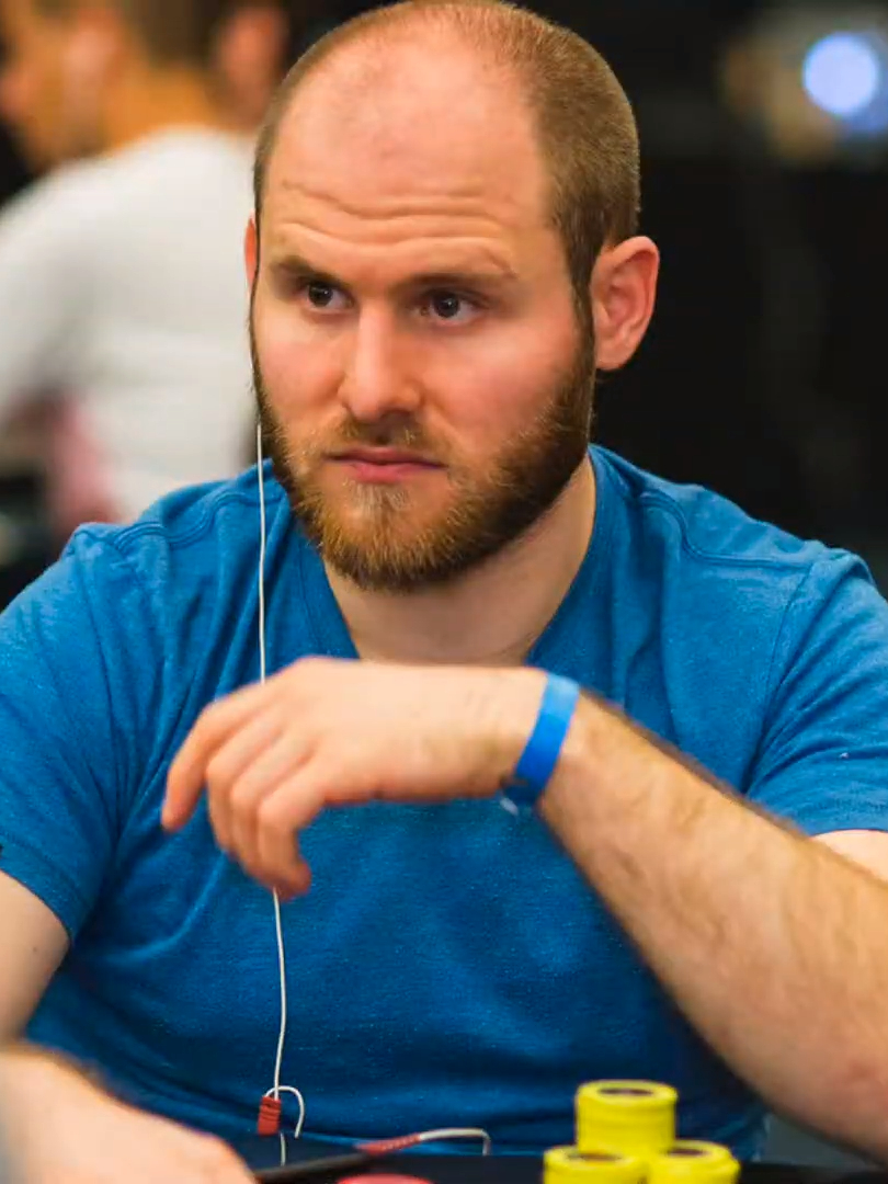 Sam Greenwood bei der WPT Caribbean